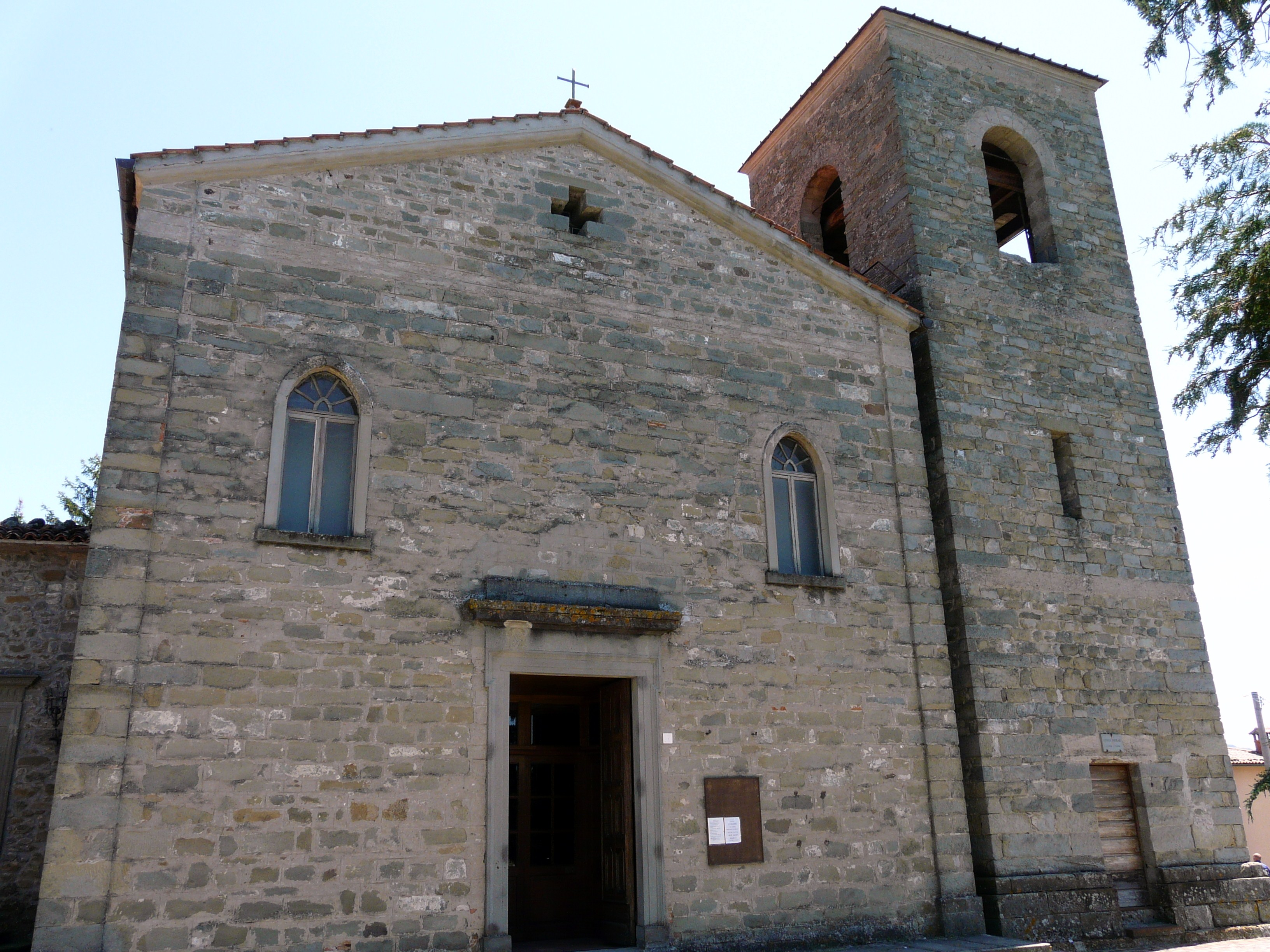 Chiesa dei Santi Sisto e Margherita, Villa Collemandina, Toscana, Italia